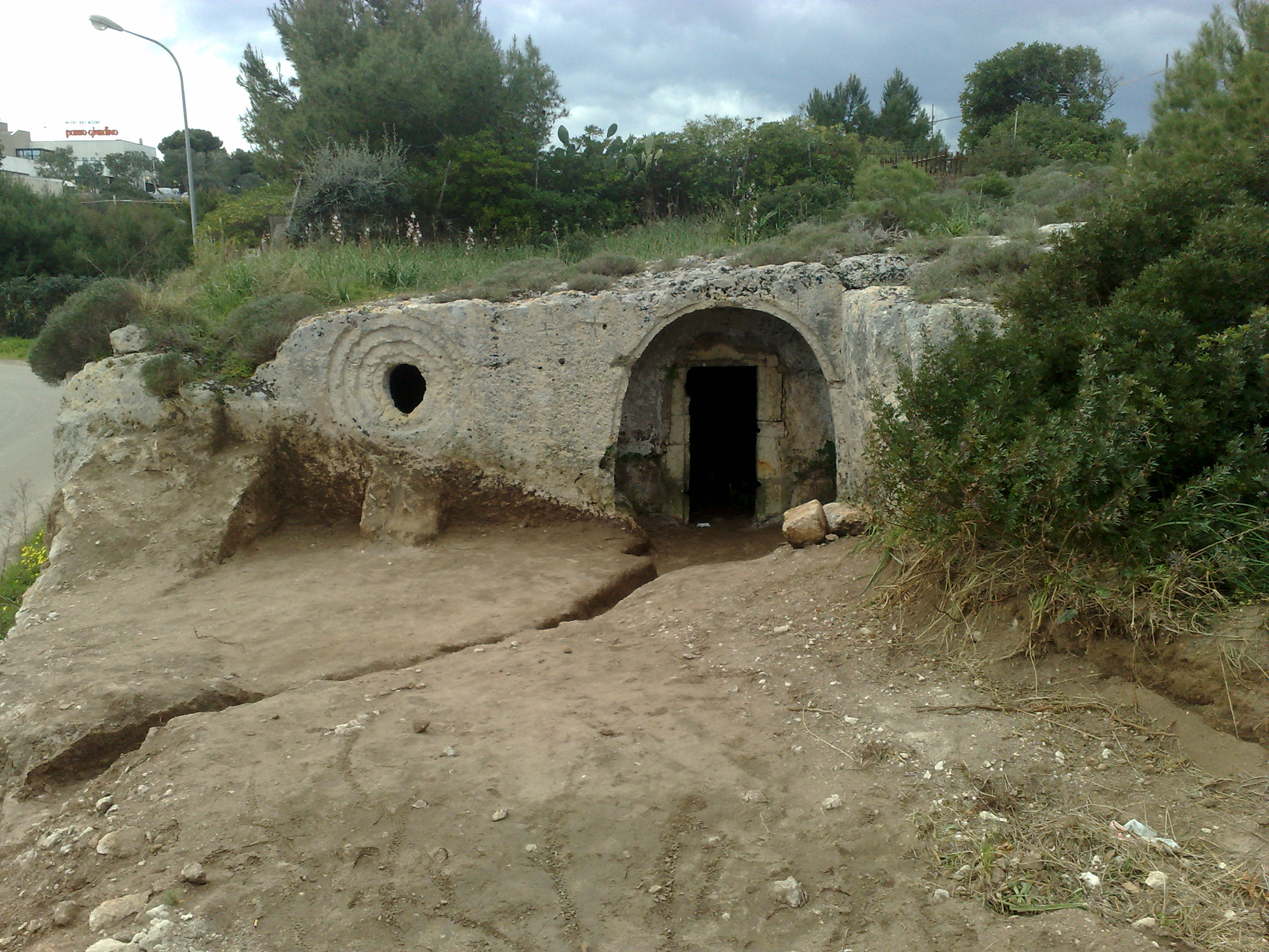 la chiesa rupestre di S.Giorgio in Monopoli, dopo la rimozione delle macerie che ne impediva la vista